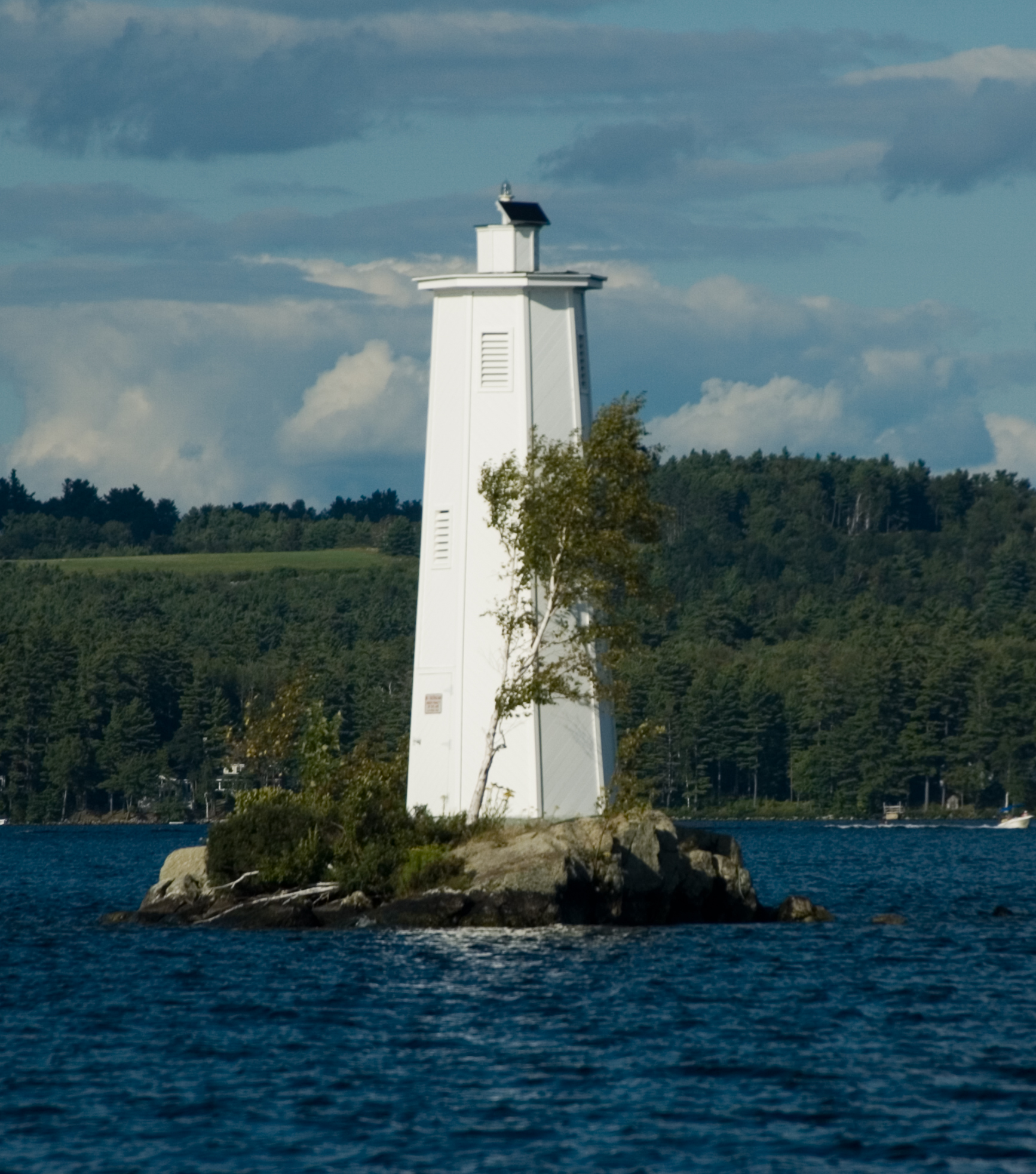 Le phare de Loon Island (Lac Sunapee-New Hampshire)